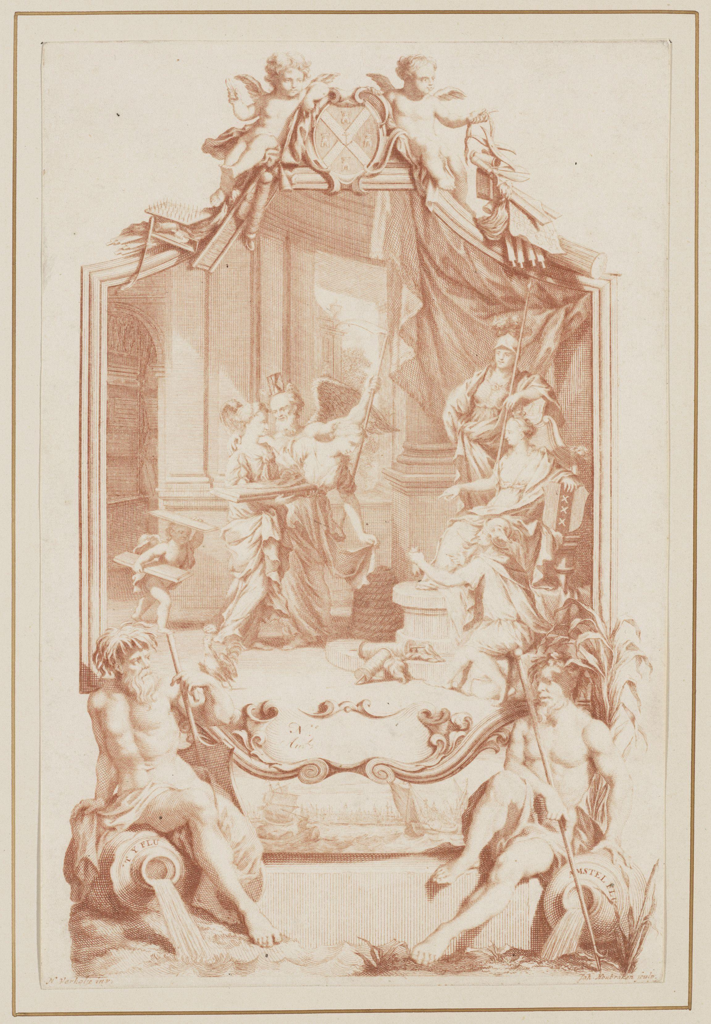 Beschrijving Adreskaart van De Neufville, handelaar in satijnen stoffen, met allegorische voorstelling op de stoffenhandel Vooraan de personificaties van de Amstel en het IJ, op het middenplan de Amsterdamse stedemaagd tussen Mercurius en Minerva die stoffen in ontvangst neemt van een putto en twee vrouwenfiguren geflankeerd door de Tijd. Geheel bovenaan twee putti met het familiewapen De Neufville. Geheel onderaan een profiel van Amsterdam vanaf het IJ. Gravure, afgedrukt in rood. Documenttype prent Vervaardiger Verkolje, Nicolaas Houbraken, J. Collectie Collectie Atlas Dreesmann Inventarissen Afbeeldingsbestand 010094006710 Generated with Dememorixer